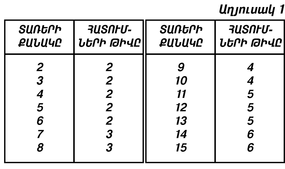 Խաչբառի ցանցում տառերի հատումների քանակը նշող աղյուսակ